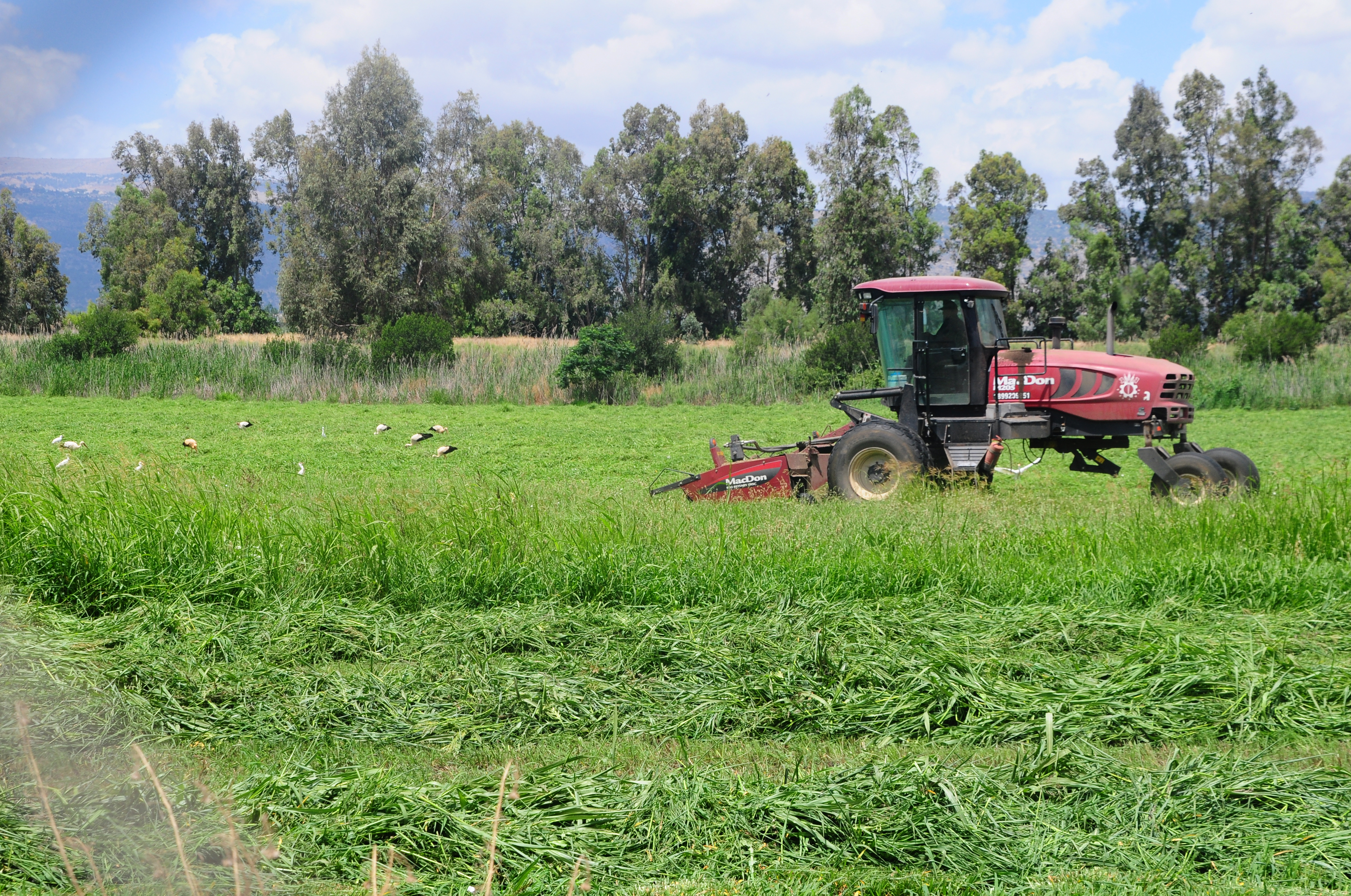 17610 Rustavi